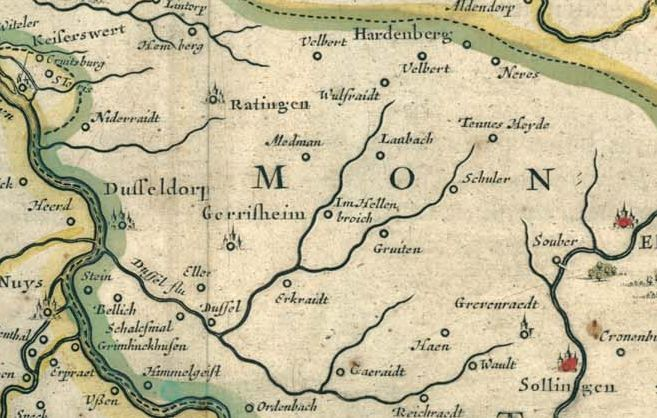 Ausschnitt einer Kartografie des Herzogtums Berg aus dem Jahre 1645 / Kirchspiel Erkrath und Nachbarorte, sowie der Lauf der Düssel Die schlecht abfotografierte alte Version der Karte wird durch eine neue Version ersetzt. Ungefähr der gleiche Ausschnitt der gleichen Karte von W.Bleau aus dem Jahre 1645 - Gemeinfrei da Urheber über 70 Jahre verstorben - DL am 27.04.2010